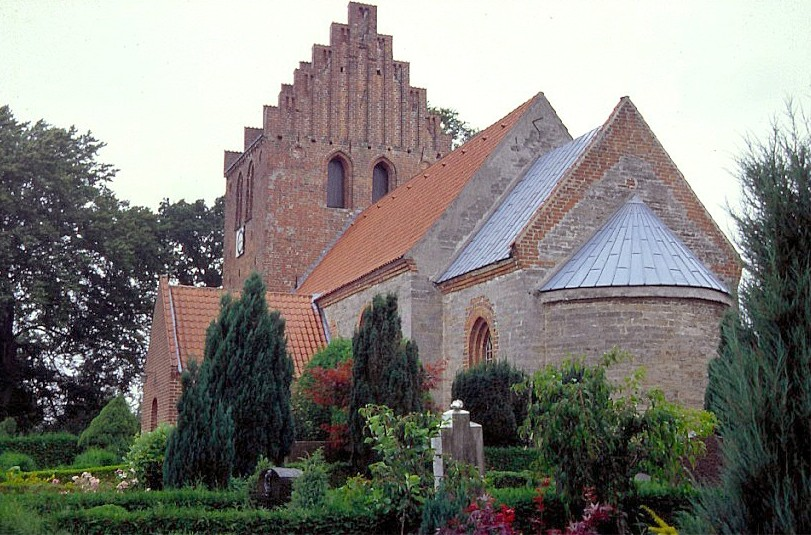 Skuldelev Kirke i Danmark. Skuldelev kirke